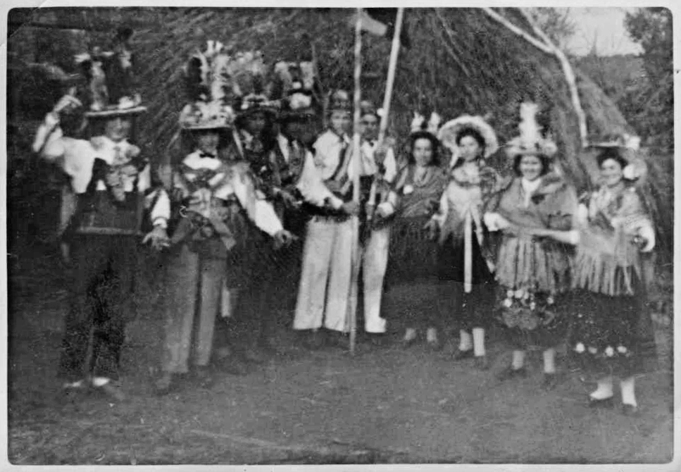 Entroido de Samede, mediados s. XX